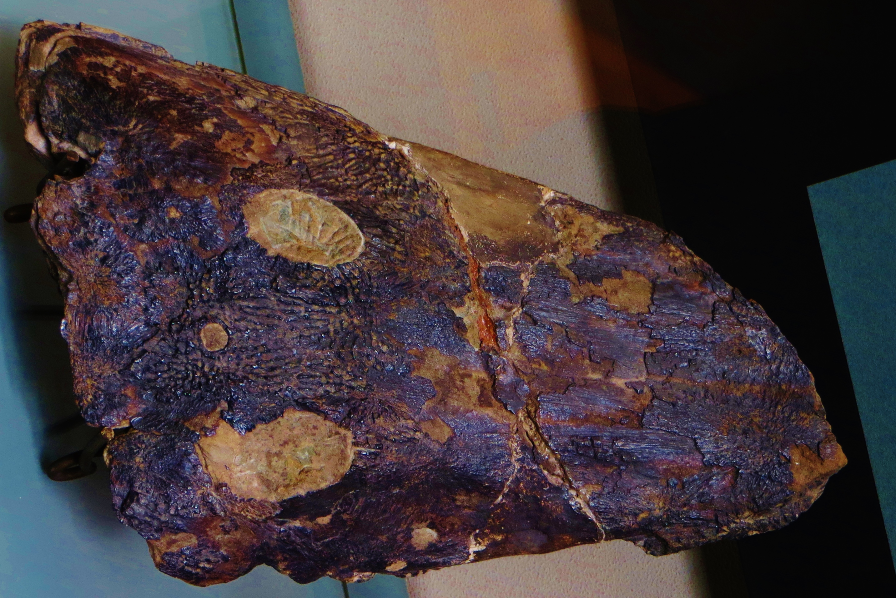 Fossil of Parotosaurus, an extinct amphibian- Took the photo at Musee d'Histoire Naturelle, Paris